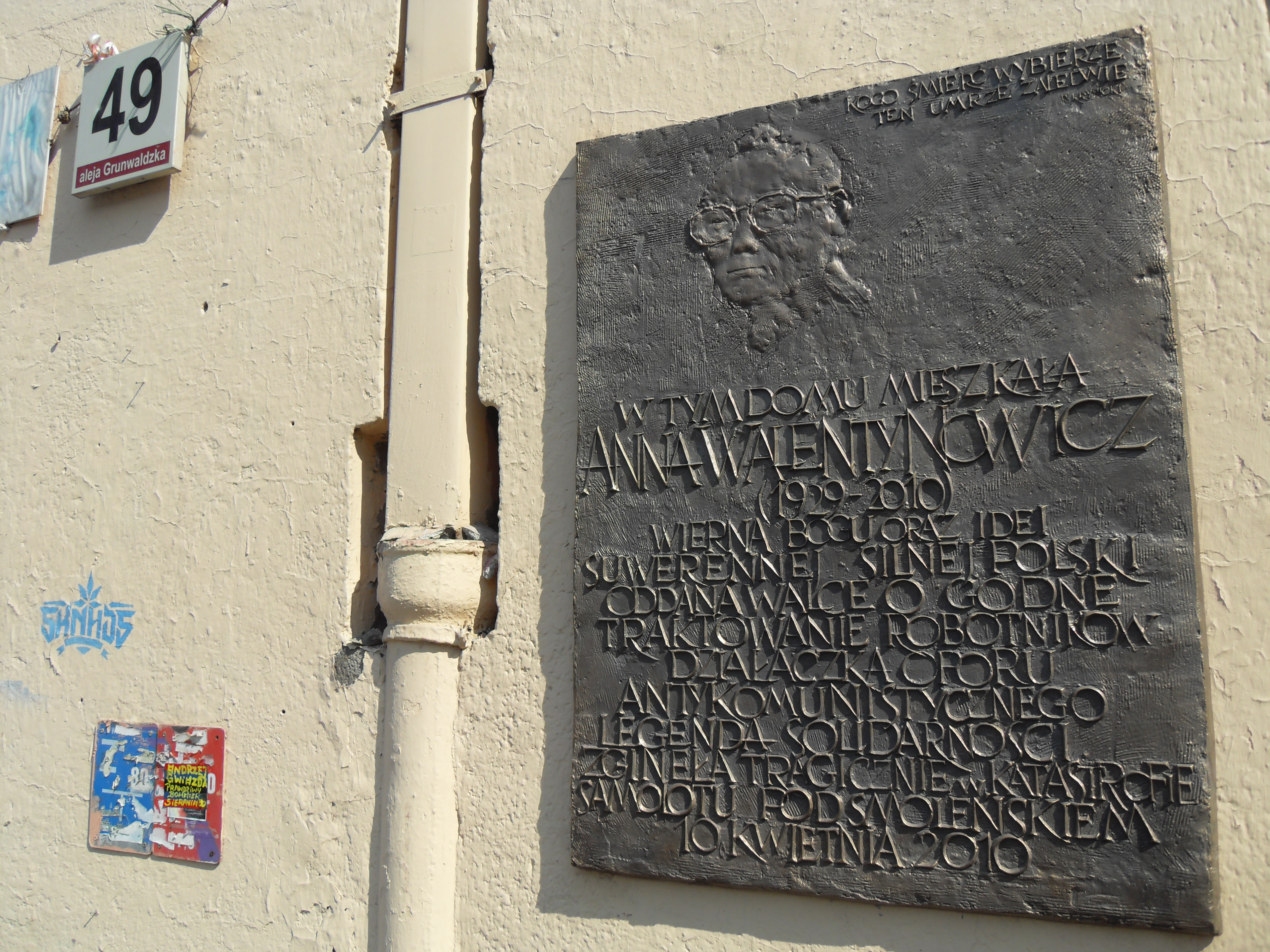 Gdańsk Wrzeszcz, ul. Grunwaldzka 49. Tablica na domu, w którym mieszkała do śmierci Anna Walentynowicz.